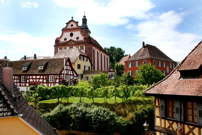 Ettenheim und Kirche